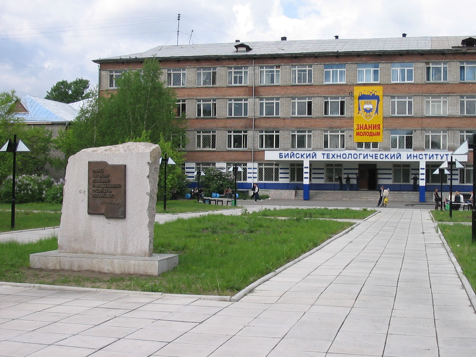 Первый учебный корпус Бийского технологического института